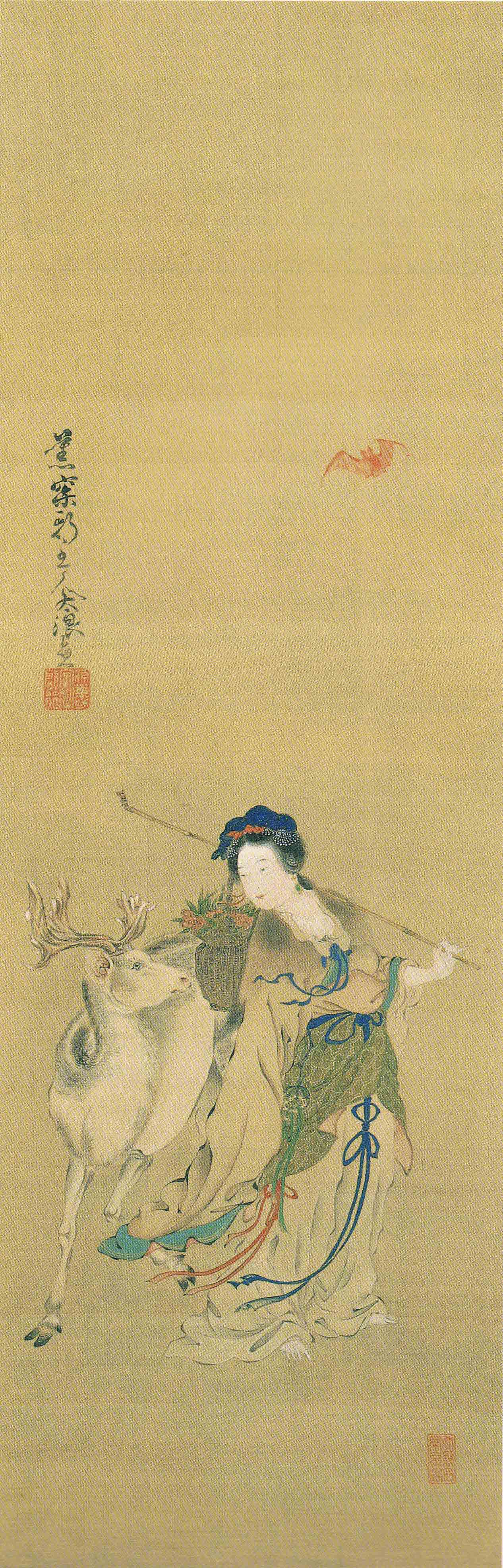 石川大浪-麻姑仙人図